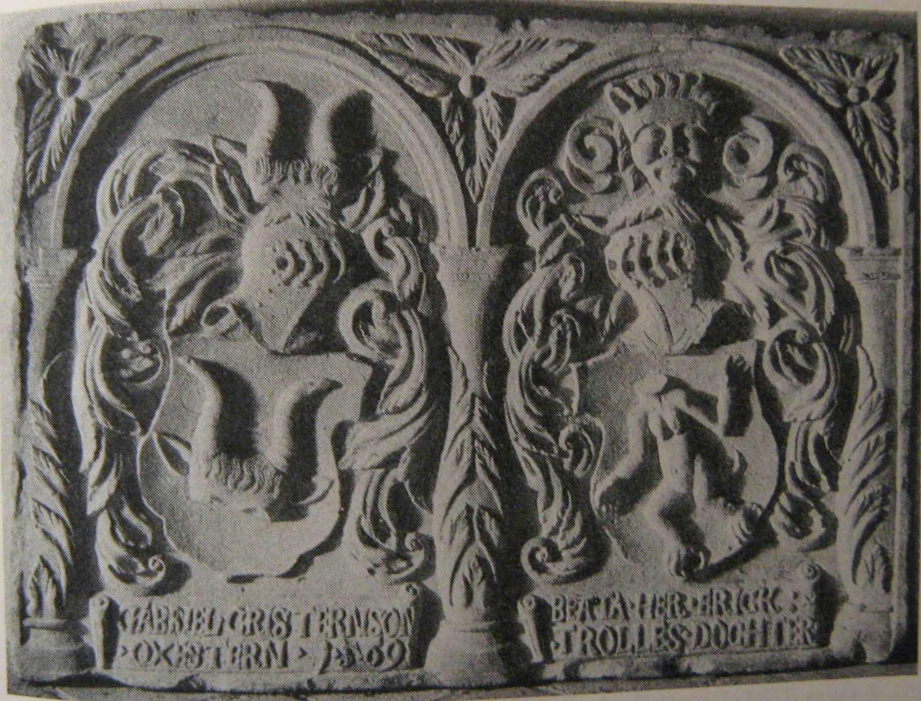 Vapentavla från Fastena kyrka, med Gabriel Christernson Oxenstierna och hans hustru Beata Eriksdotter Trolles vapen. Har ursprungligen suttit över Mörby slotts port.